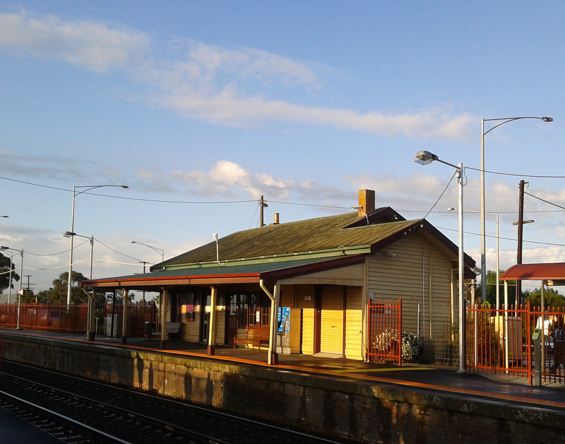 WallanTrainStation